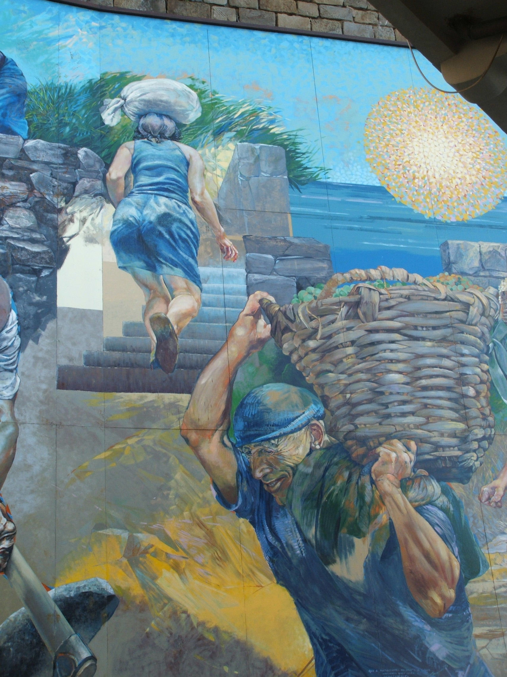 Immagine dalle Cinque Terre Murale a Riomaggiore (part.)